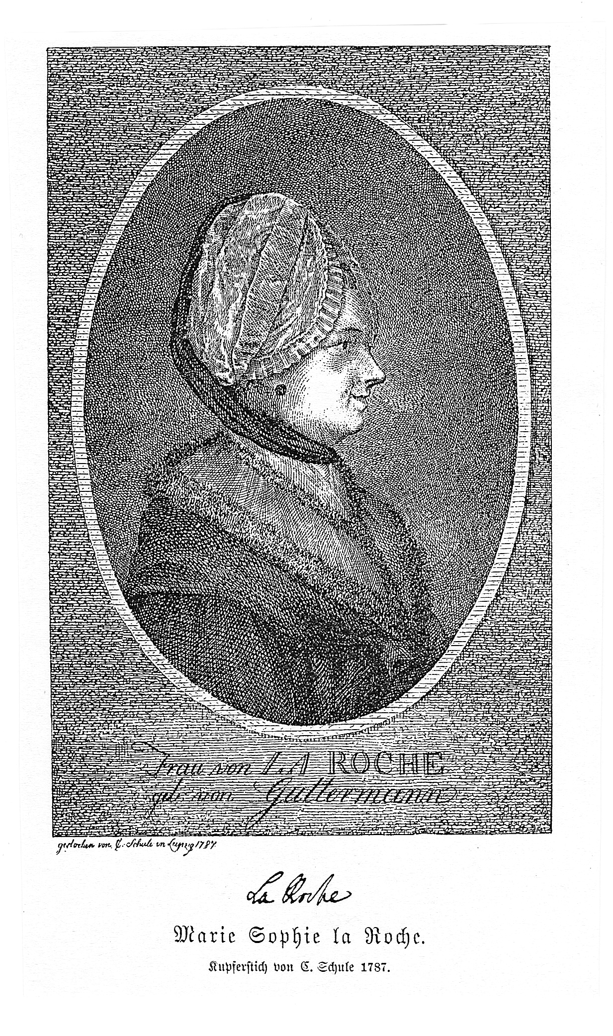 Portrait of Sophie von La Roche (1730-1807)